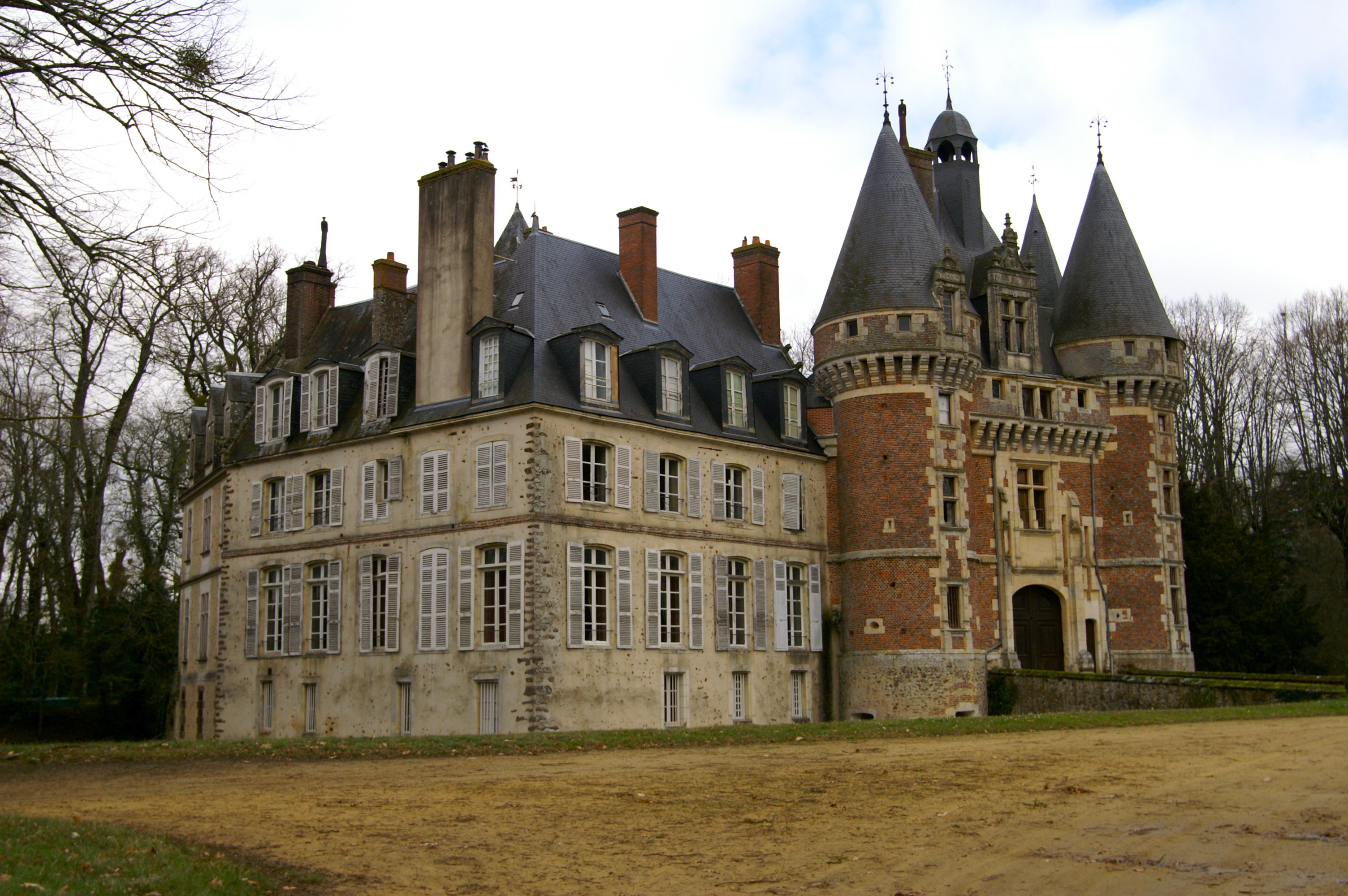 Le château de Saint-Agil, Loir-et-Cher